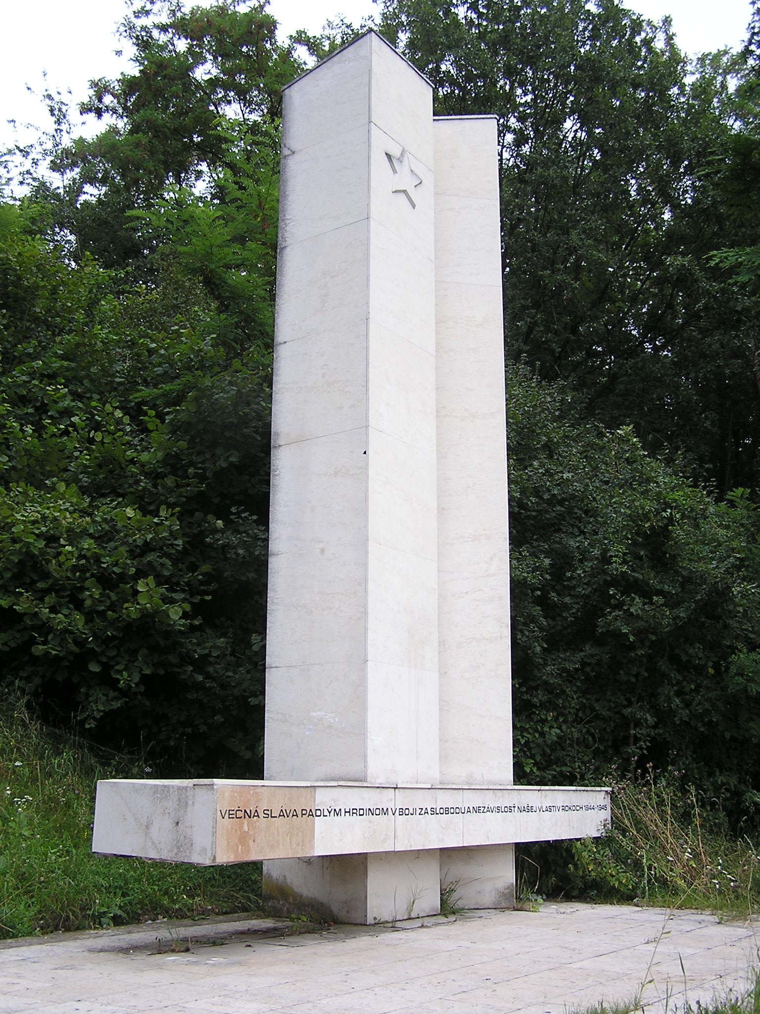 pomník